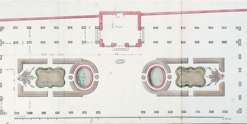 Projet de l'architecte Ange-Jacques Gabriel pour le jardin du « Pavillon de treillage » devant être dressé dans le Nouveau Jardin du Roi (Petit Trianon)